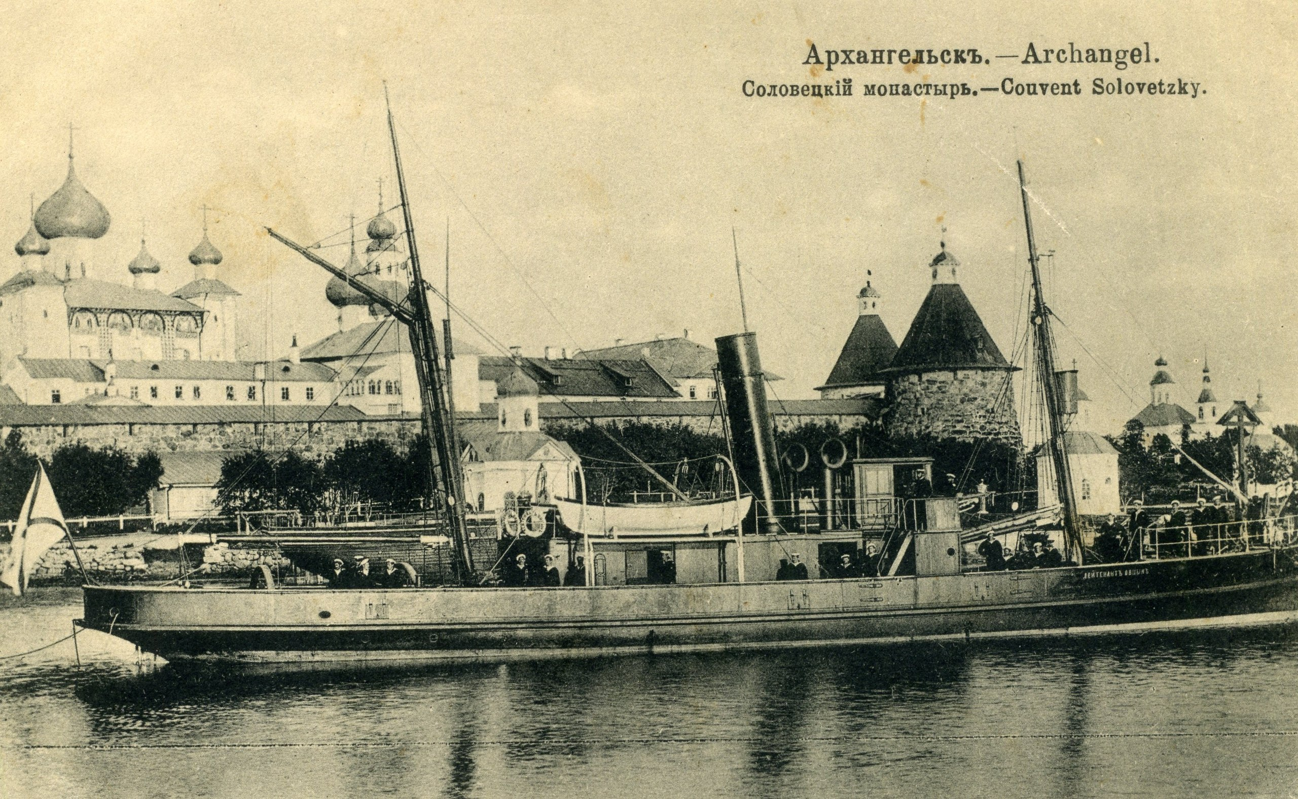 Пароход "Лейтенант Овцын" на Соловках